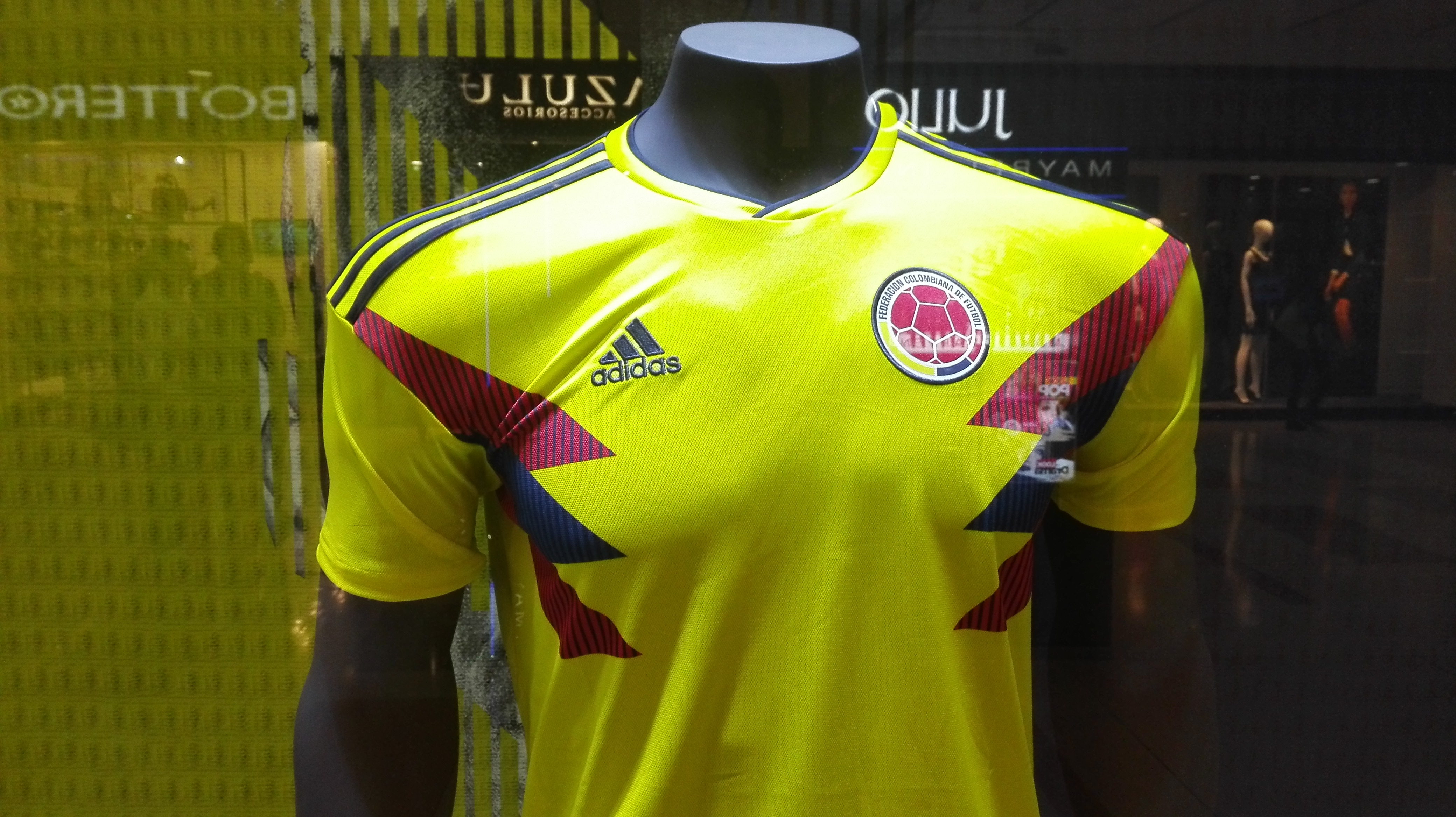 Camiseta Adidas de la Selección Colombia en el Mundial de Rusia 2018, exhibida en una tienda de Bogotá.